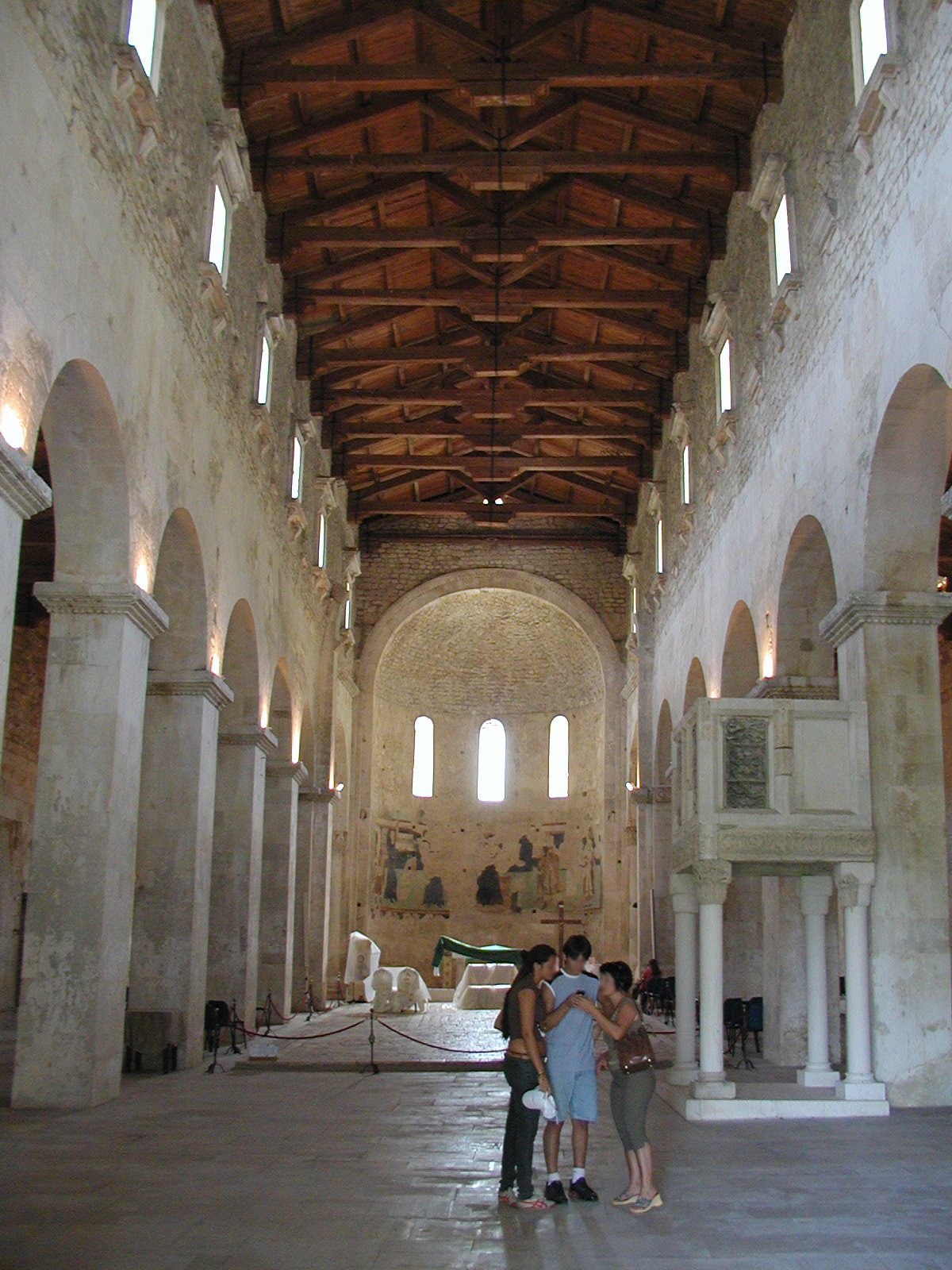 San Liberatore a Majella